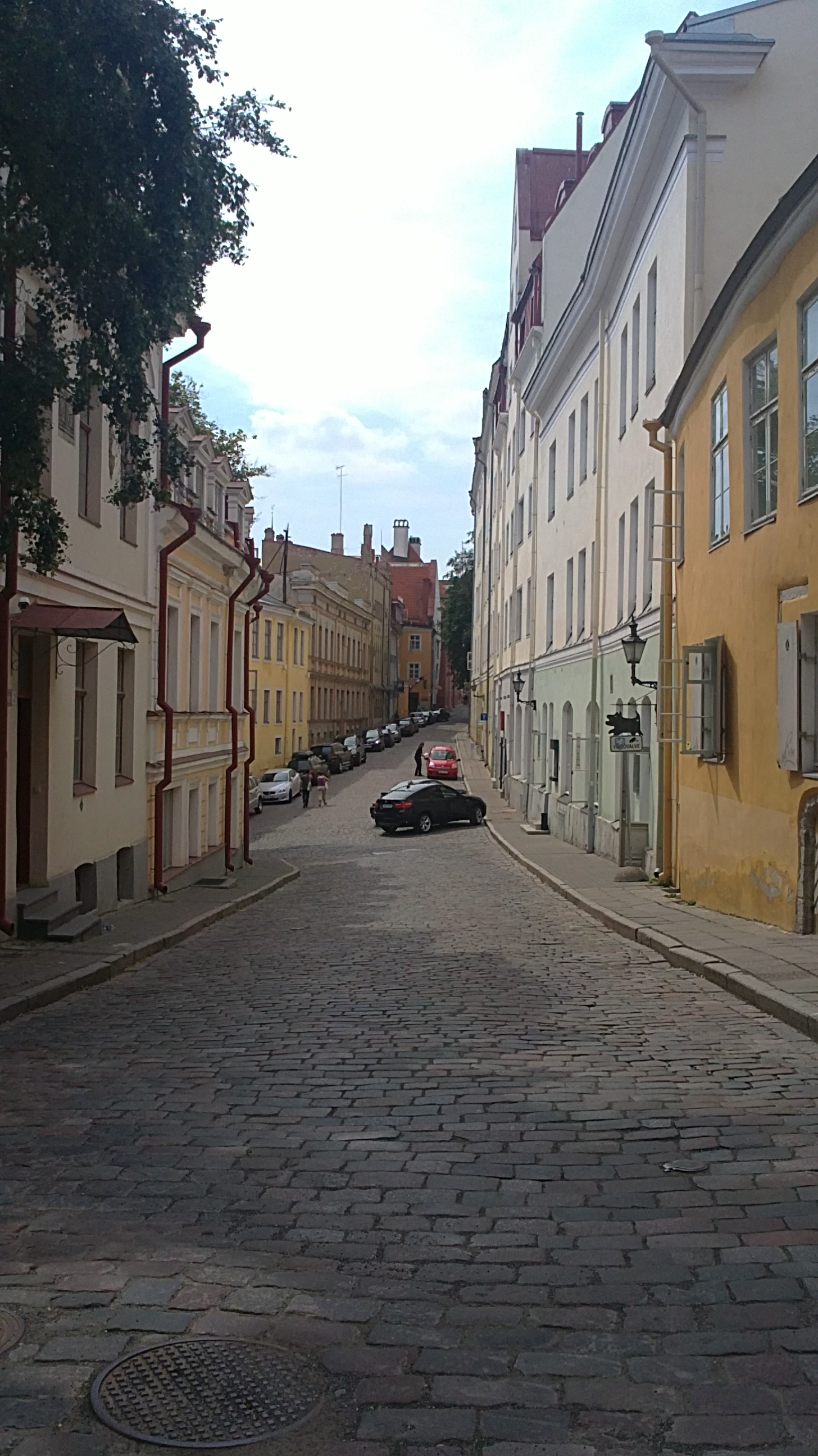 Vaade Olevimäele Sulevimäelt, Tallinna vanalinn